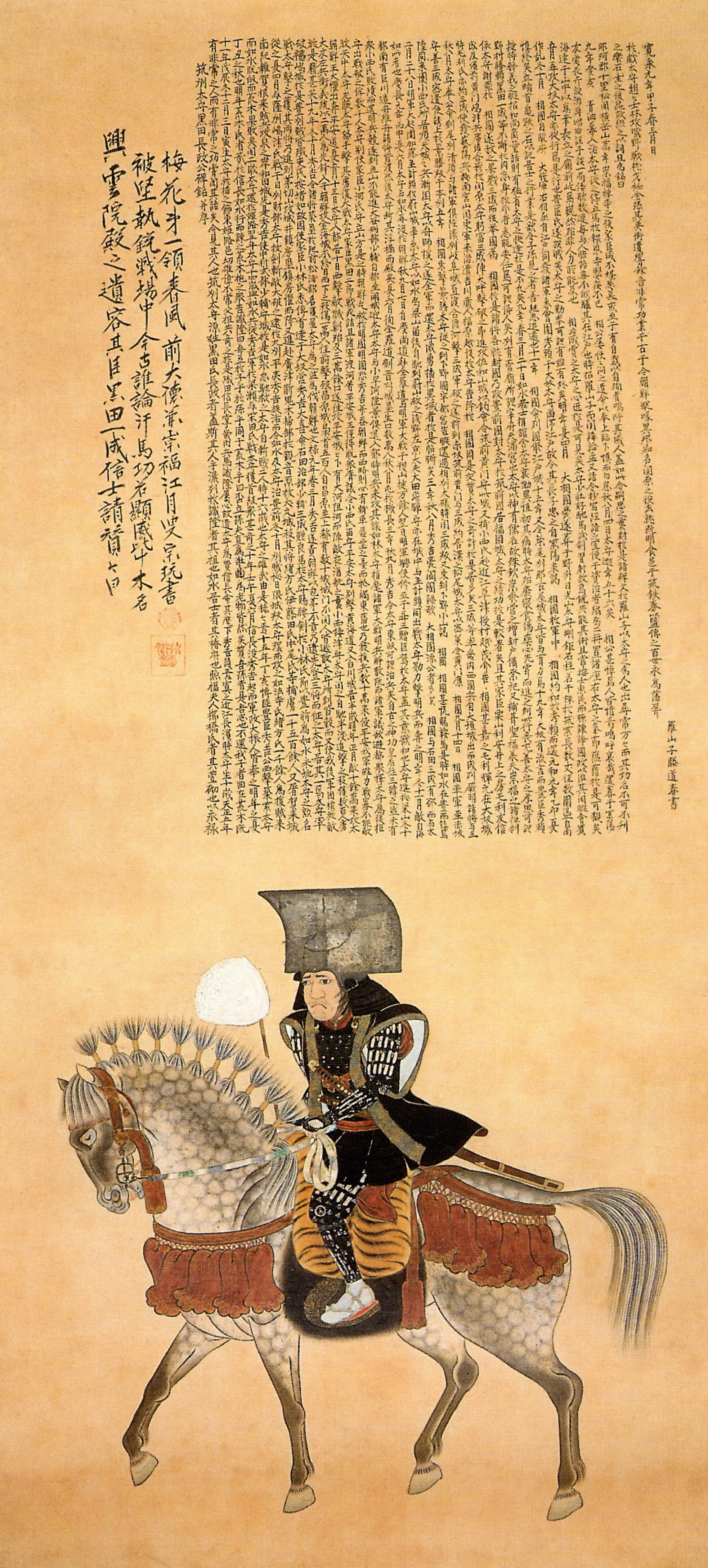 黒田長政。Kuroda Nagamasa.